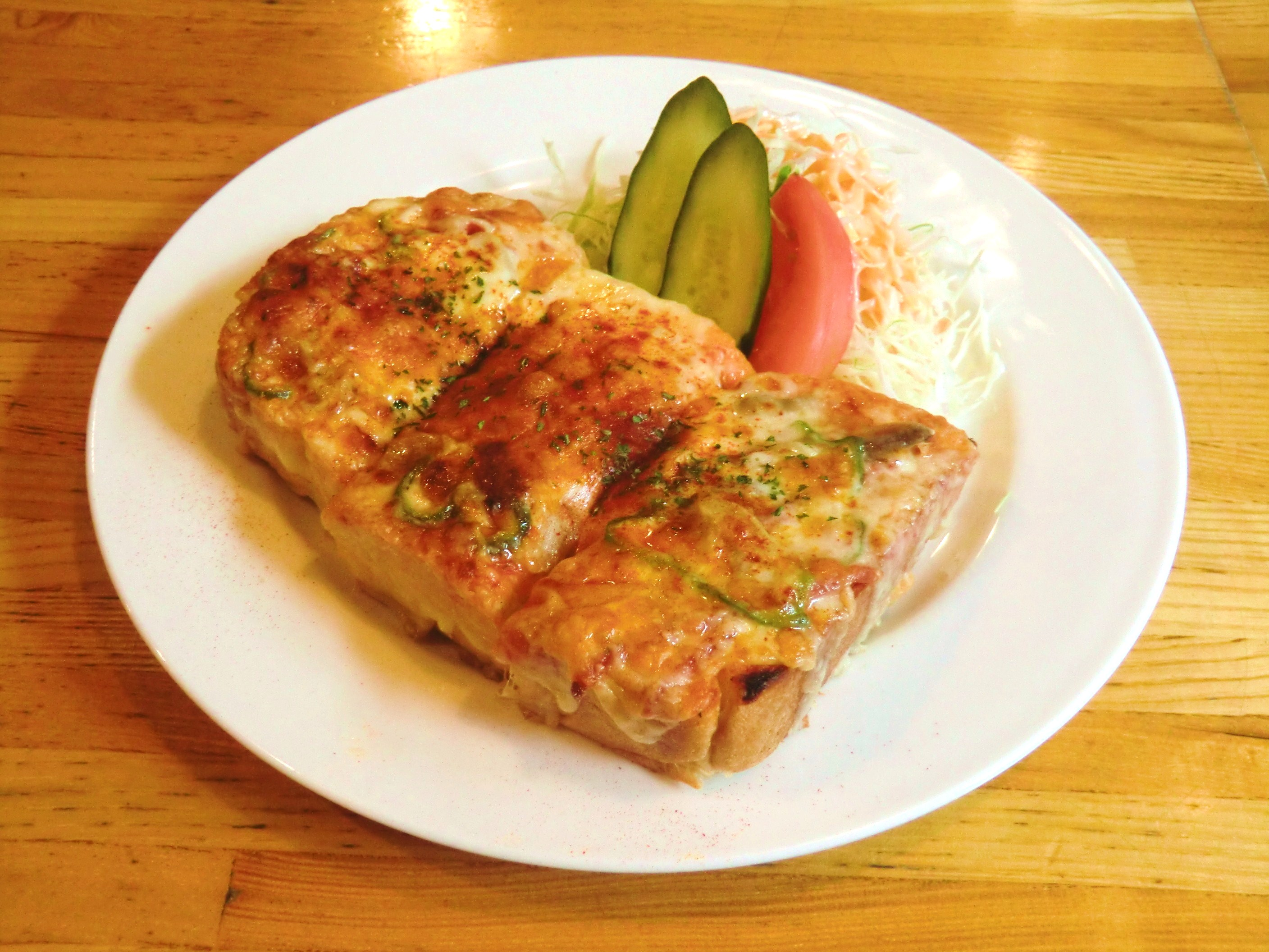 有楽町の喫茶店「紅鹿舎（べにしか）」のピザトースト。同店はピザトースト発祥の店とされる。